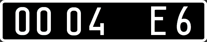 Номерной знак автомобилей вооружённых сил Украины, с 2004 года